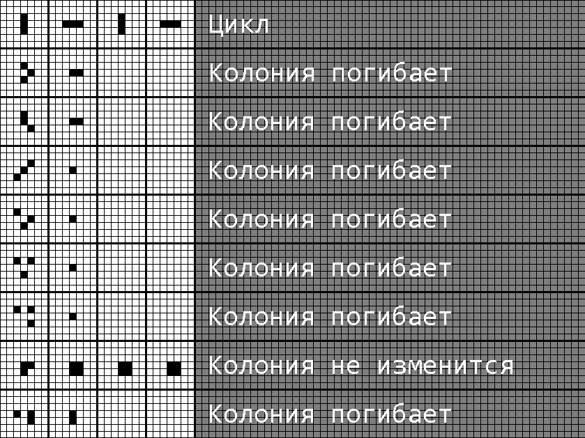 Развитие колоний, состоящих из трёх точек